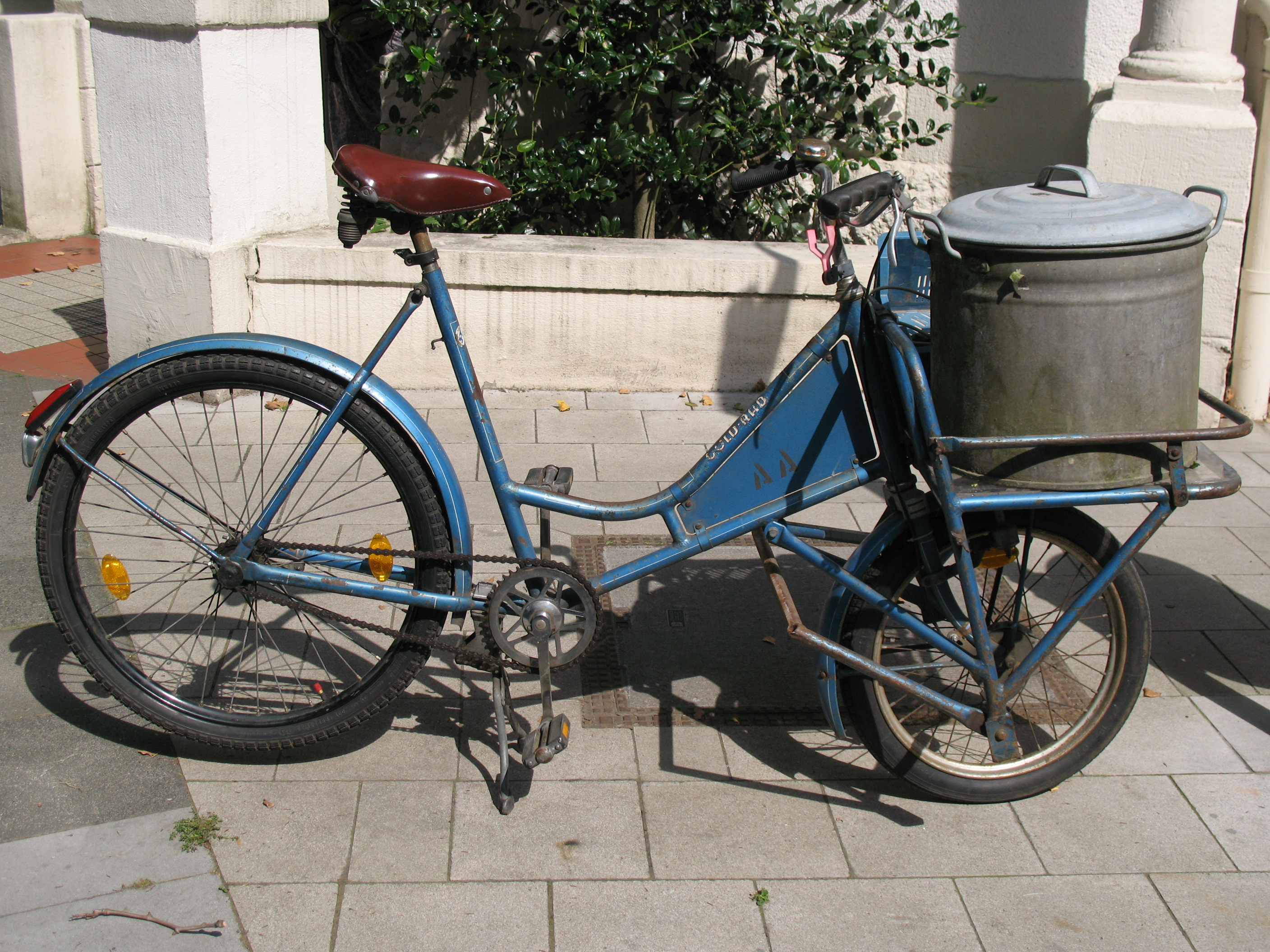 Bäckerrad von 1955, Einkoch-Kessel auf rahmenfestem Vorder-Gepäcktrager, 02. 08. 2011.